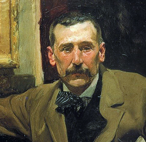 Retrato del escritor español Benito Pérez Galdós (1843-1920).